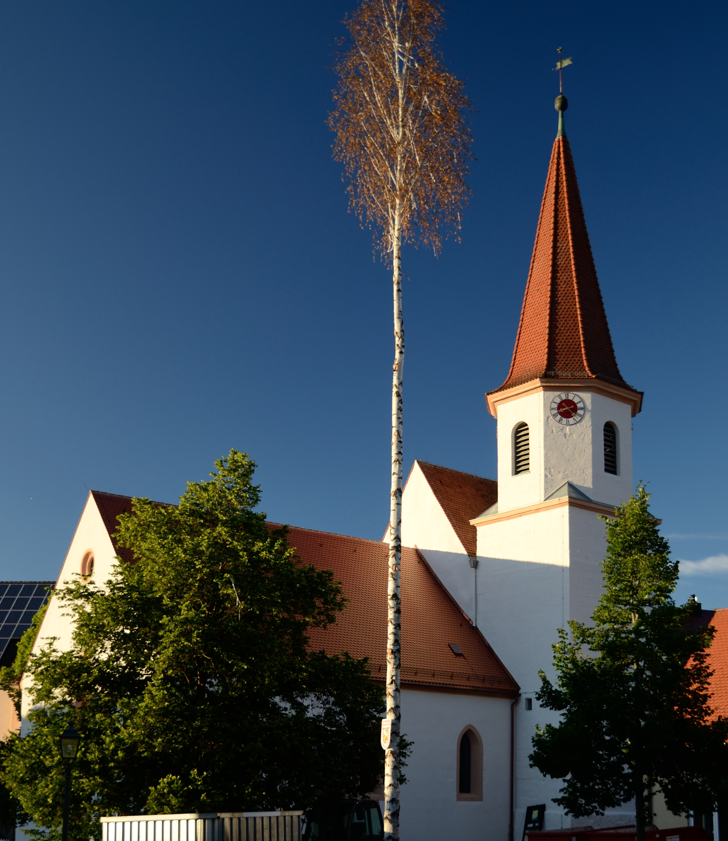 St. Bartholomäus, Brodswinden